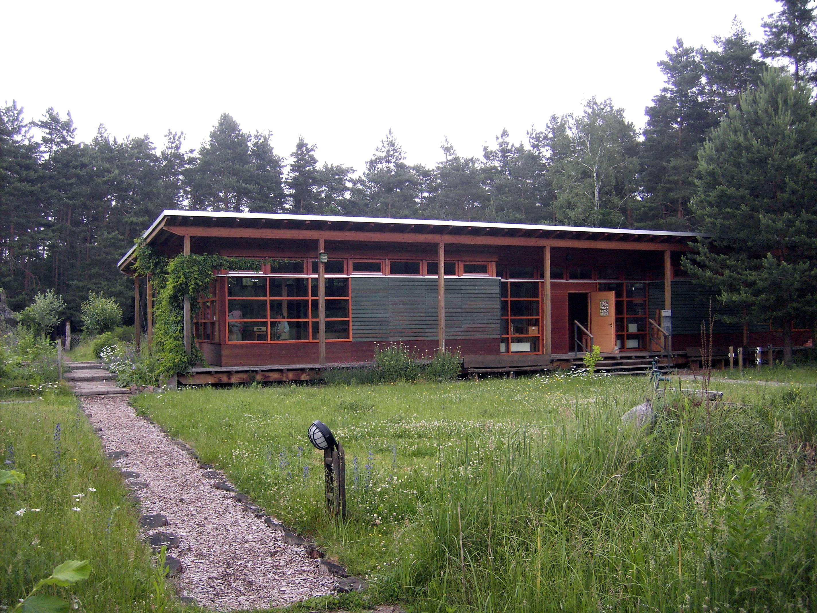 Informationspavillon Auenhaus - im Informationszentrum des Biosphärenreservates Mittelelbe